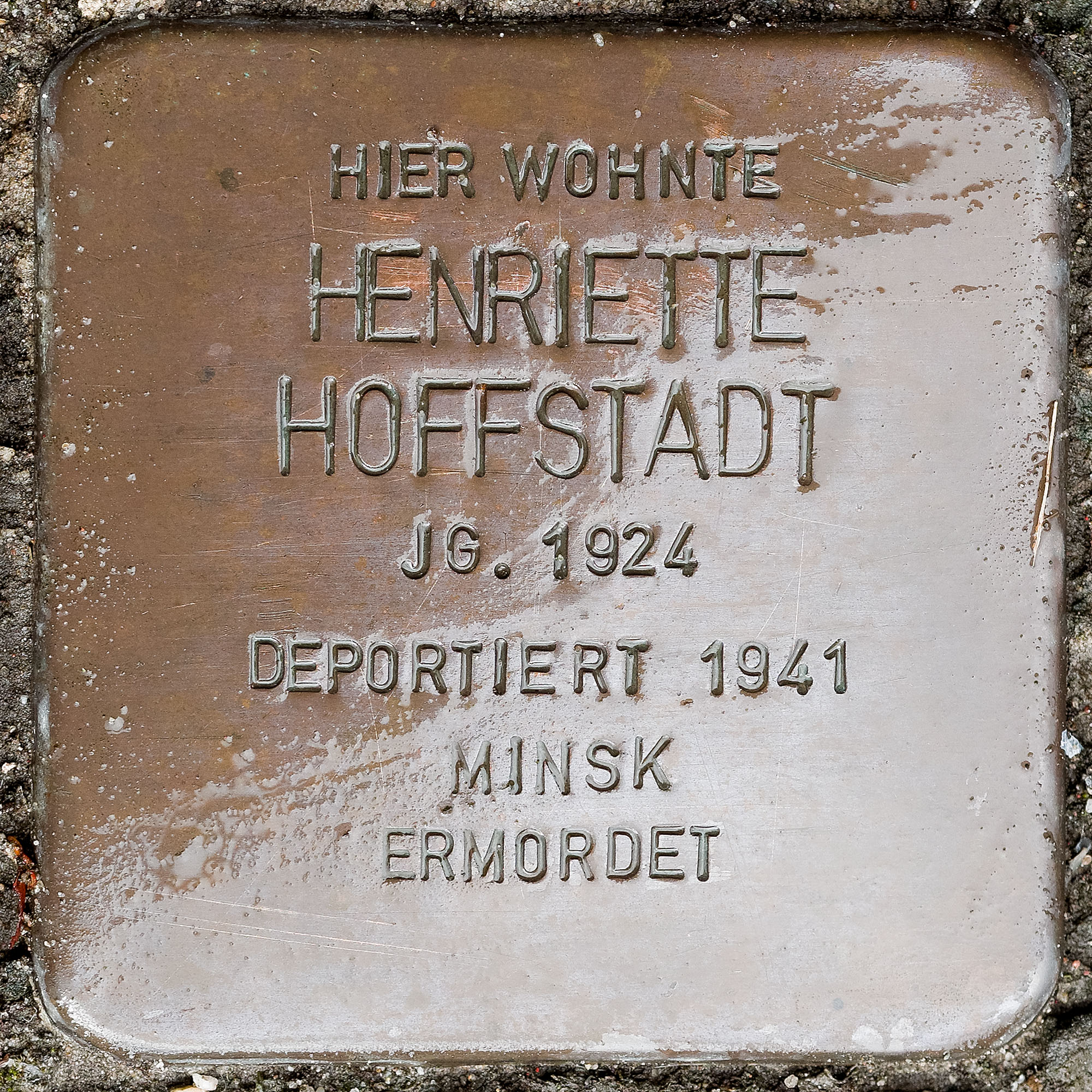 Stolpersteine Straelen: Hoffstadt, Henriette